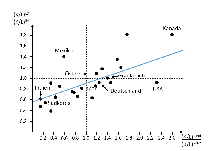 Grafische Darstellung des Faktorpreisausgleichs; wobei K = Produktionsfaktor Kapital und L = Produktionsfaktor Arbeit ist. EX und IM sethen jeweils für Export und Import. (Vgl. Morasch, Karl: Internationale Wirtschaft, S. 92)